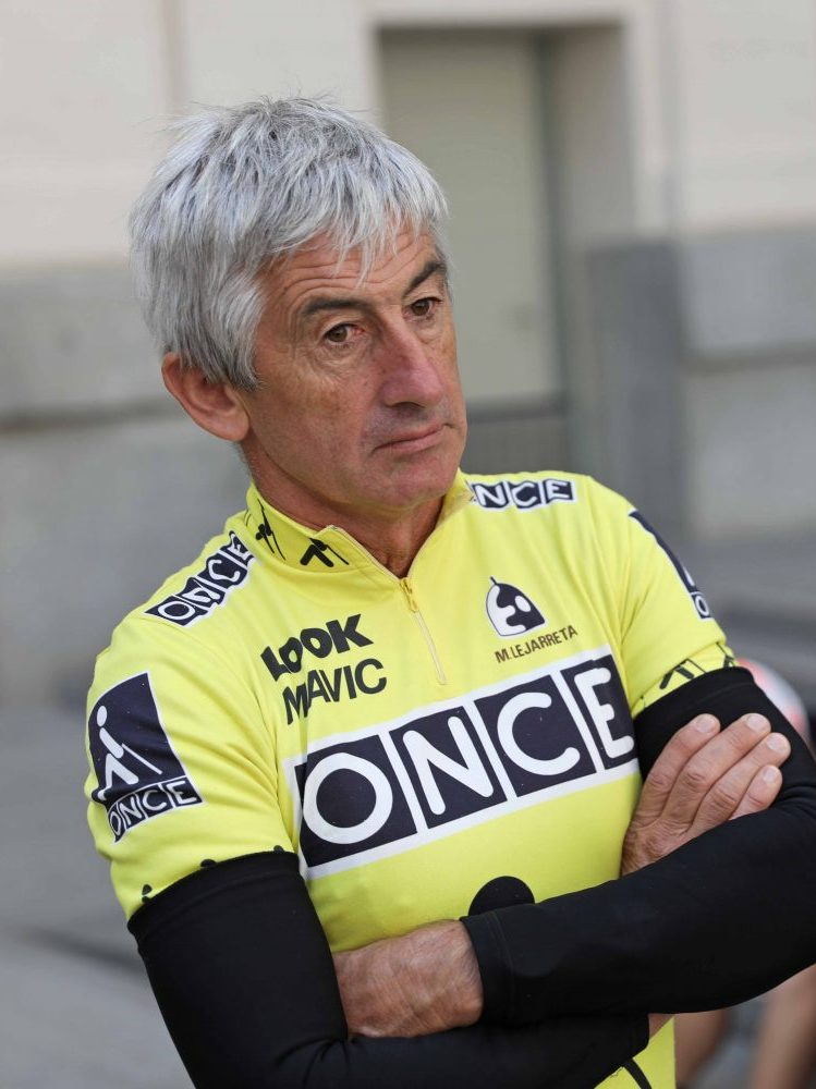 La Clásica Otero se incorpora por segundo año consecutivo a la programación de La Celeste. La delegada de Medio Ambiente y Movilidad, Inés Sabanés, ha recibido este mediodía a los participantes de la nueva edición de la marcha cicloturista en la Galería de Cristal del palacio de Cibeles, desde donde ha aprovechado para incidir en el importante protagonismo que la bicicleta tiene hoy en las ciudades. “La bicicleta tiene cada día mayor presencia en la ciudad. Además de su relevancia como deporte, las ciudades necesitan el fomento de la bici como medio de transporte para mejorar la calidad del aire”, ha manifestado.